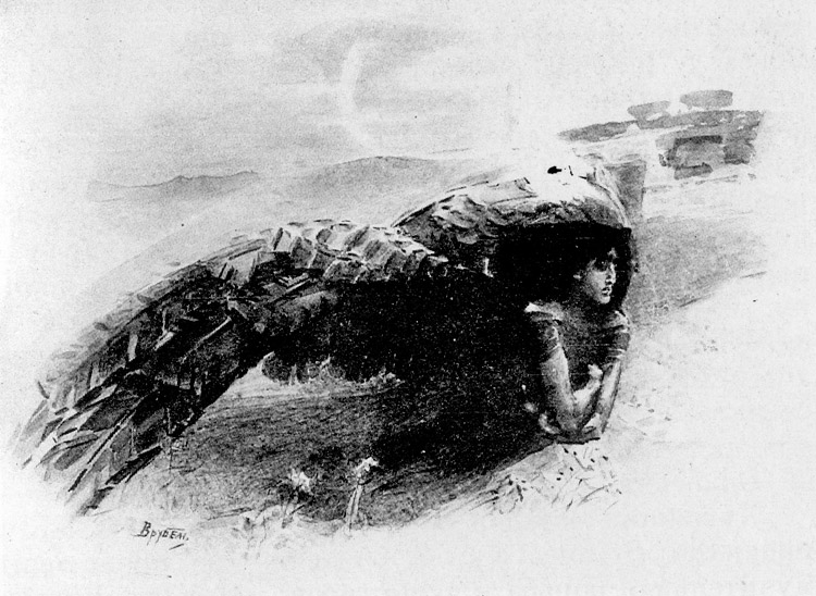 Михаил Врубель. Иллюстрации к поэме Лермонтова "Демон". Демон летящий